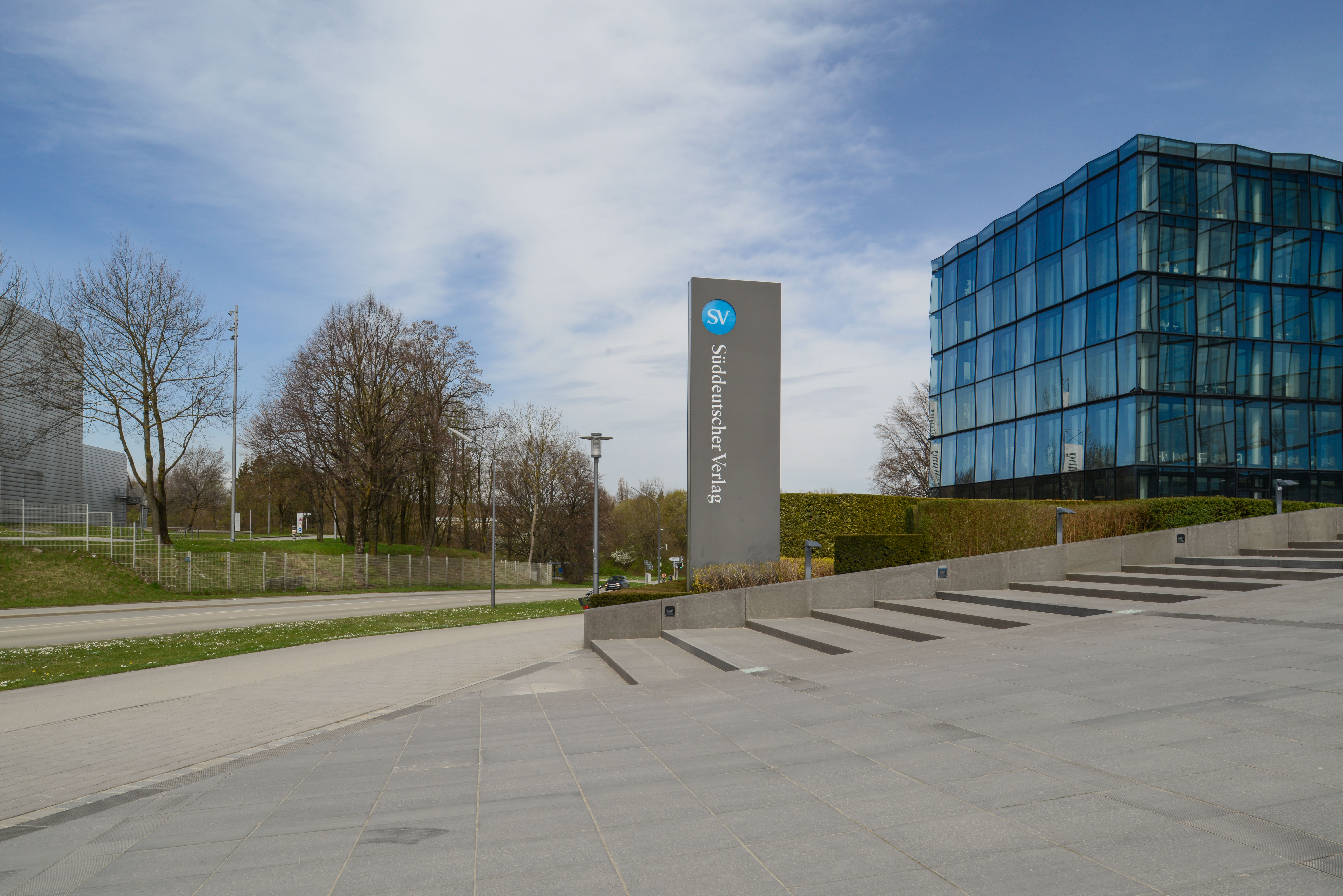 Süddeutsche Zeitung - Süddeutscher Verlag